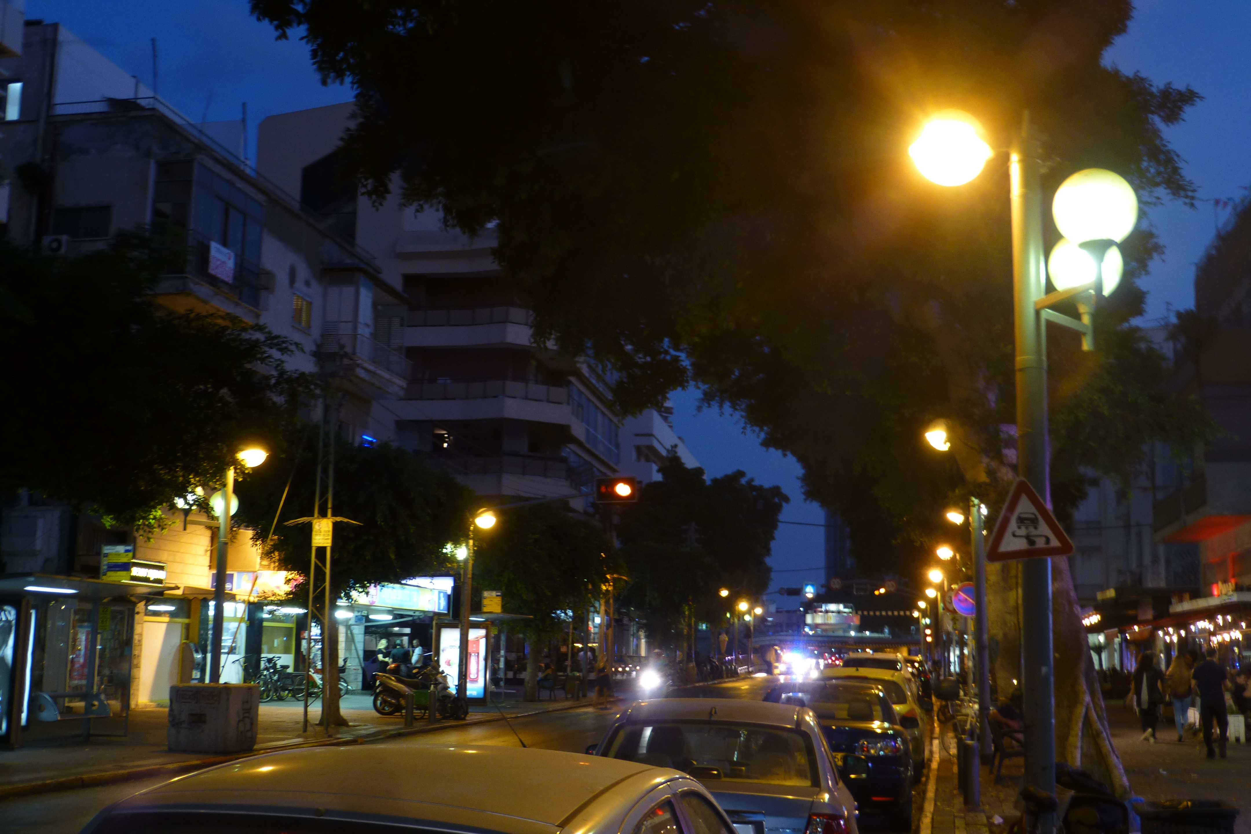 כיכר צינה דיזנגוף קרויה על שם צינה דיזנגוף, רעייתו של ראש העיר הראשון, מאיר דיזנגוף. הכיכר נחשבה במשך שנים רבות כאחד מסמליה של תל אביב. הכיכר הייתה חלק מתוכנית גדס, תוכנית מתאר לעיר תל אביב שהכין פטריק גדס, מתכנן ערים סקוטי. עיצוב הכיכר נעשה על ידי האדריכלית ג'ניה אוורבוך, שזכתה בתחרות העיצוב של הכיכר בשנת 1934. התכנון היה על פי קריטריונים של הסגנון הבינלאומי, שהיה הסגנון האדריכלי המרכזי בתל אביב בתקופה זו.